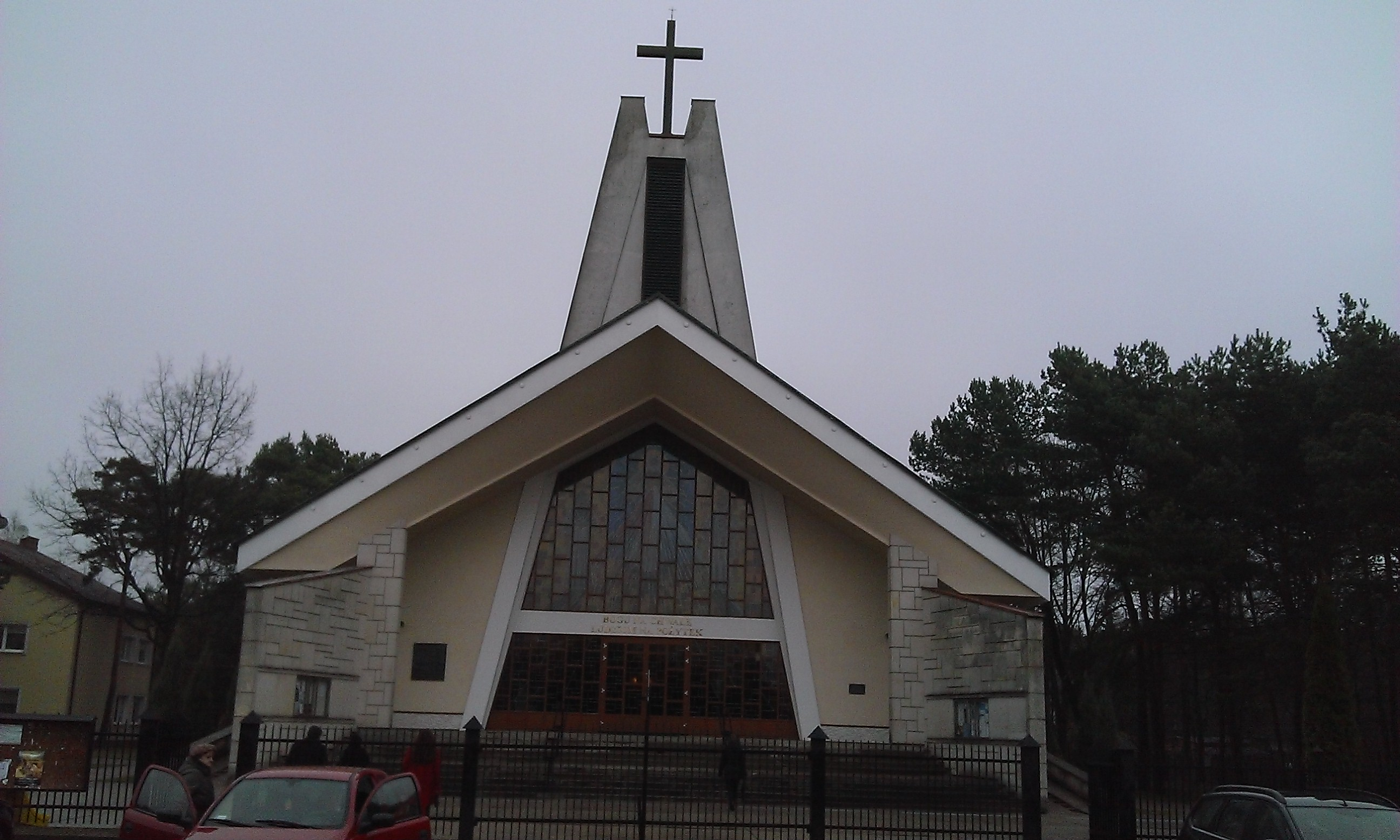 Ostrówek (gm. Klembów, pow. Wołomin - kościół NMP Matki Kościoła